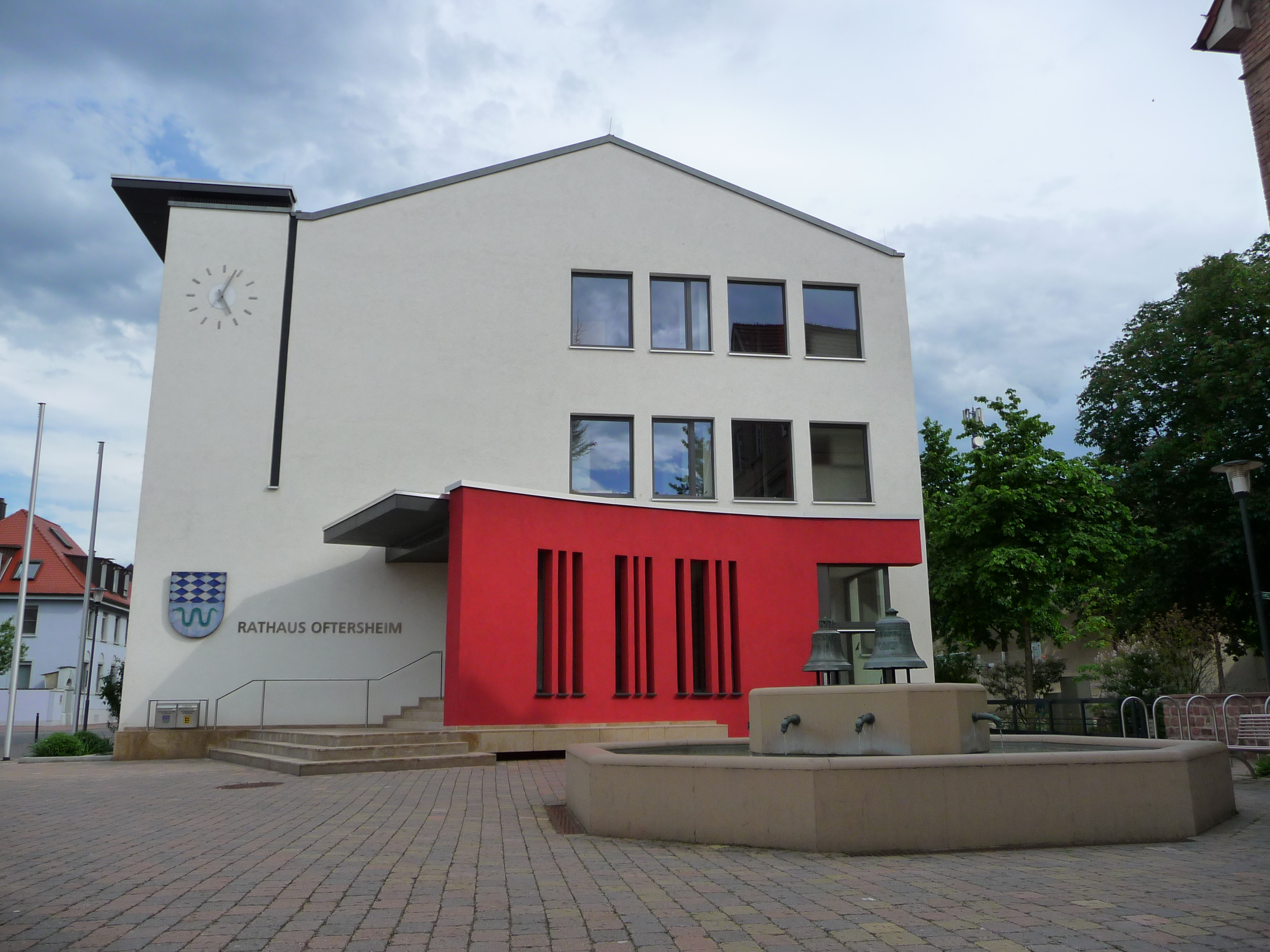 Neuer Haupteingang des 2006 sanierten Rathauses in Oftersheim, davor Brunnen mit zwei Glocken (Rhein-Neckar-Kreis, Deutschland)